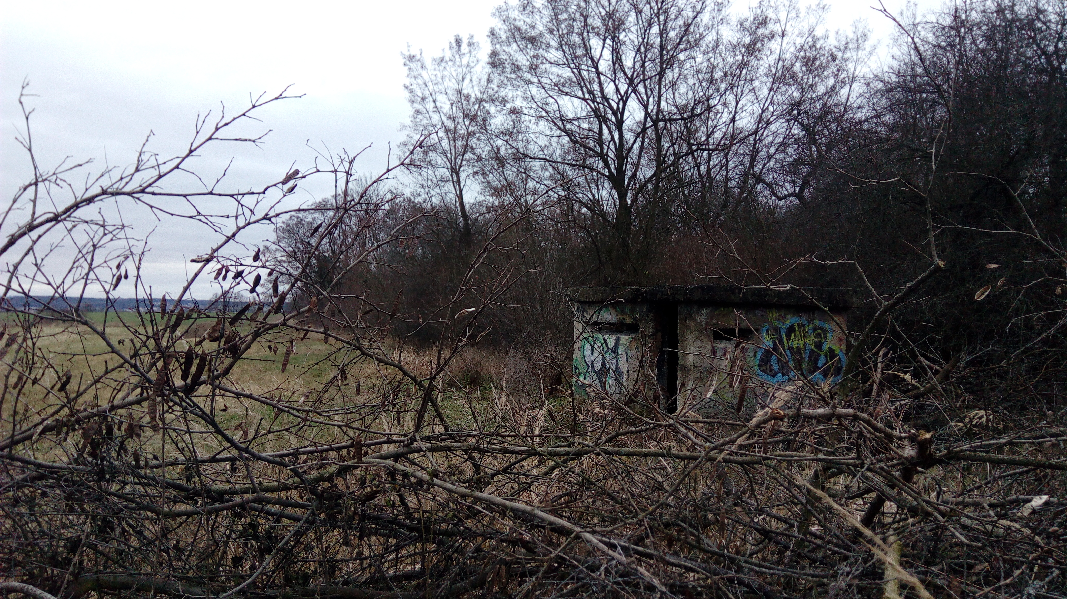 Bývalá vojenská pozorovatelna po sovětské armádě z roku 1968 nedaleko staré vojenské střelnice na místě bývalého sovětského tábora na Švábově Hrádku, návrší mezi Čtyřmi Dvory a Šindlovými Dvory v Českých Budějovicích.